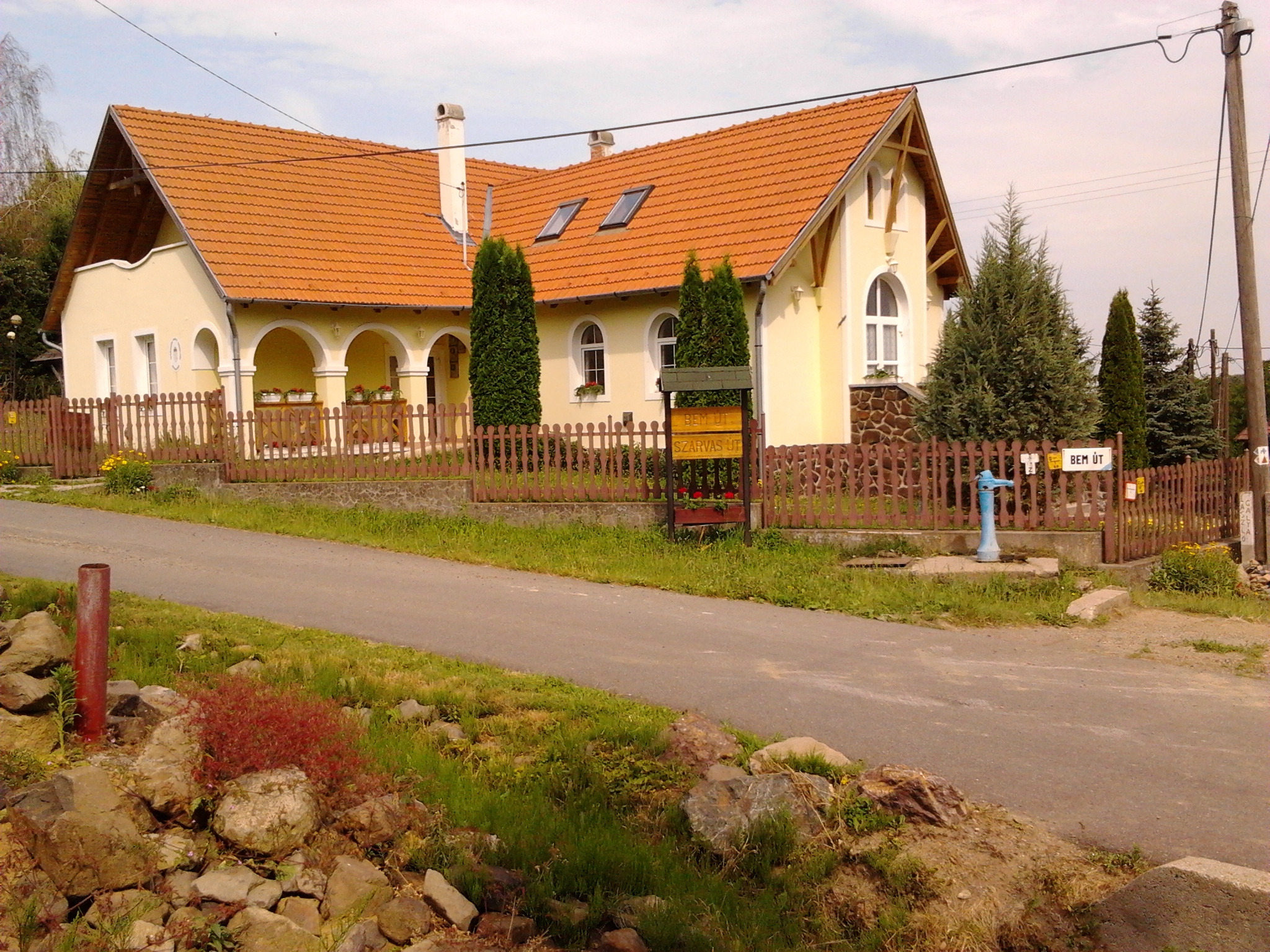 Faluház